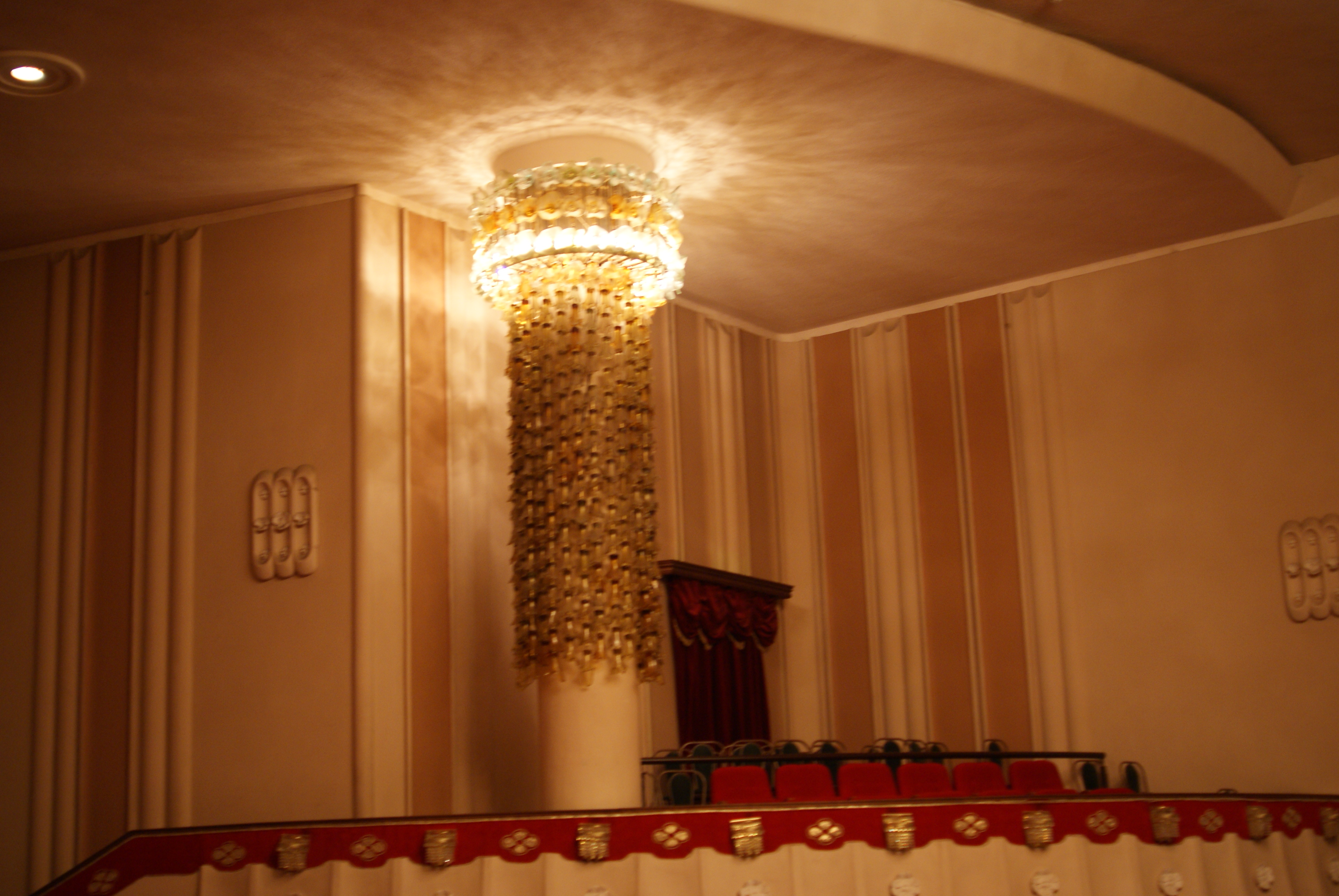 Тысяча і адна ноч у Беларускім дзяржаўным акадэмічным музычным тэатры